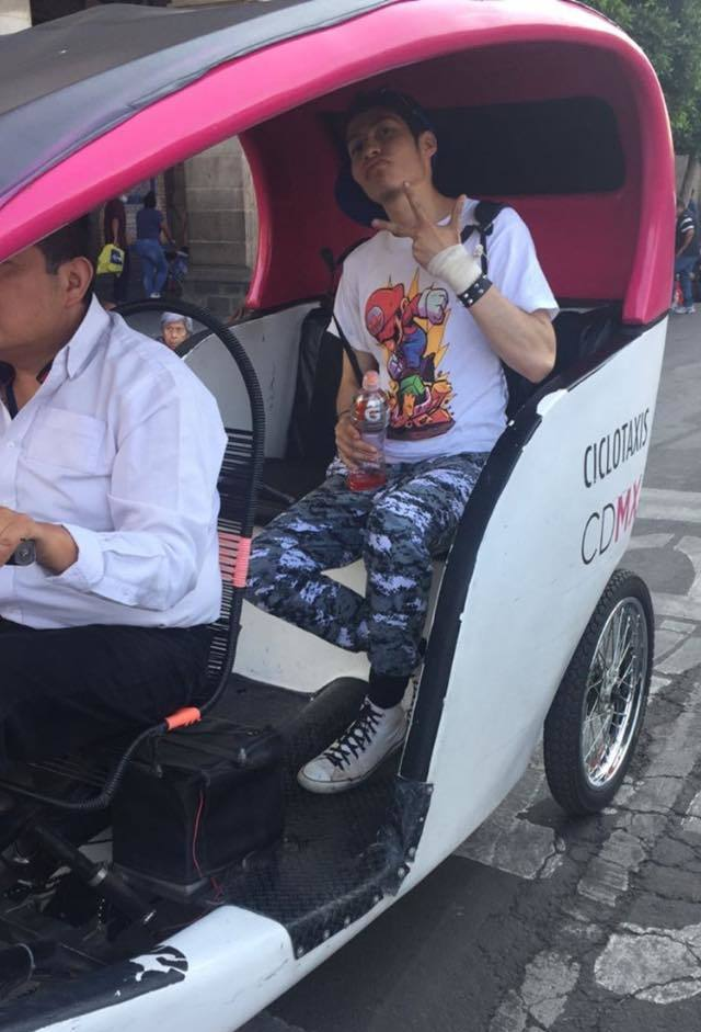 Bicitaxi en Ciudad de México, 2019.